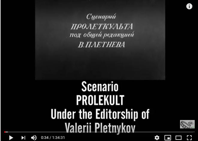 Кадр из фильма "Стачка" 1924 года, перешедшего в общественное достояние